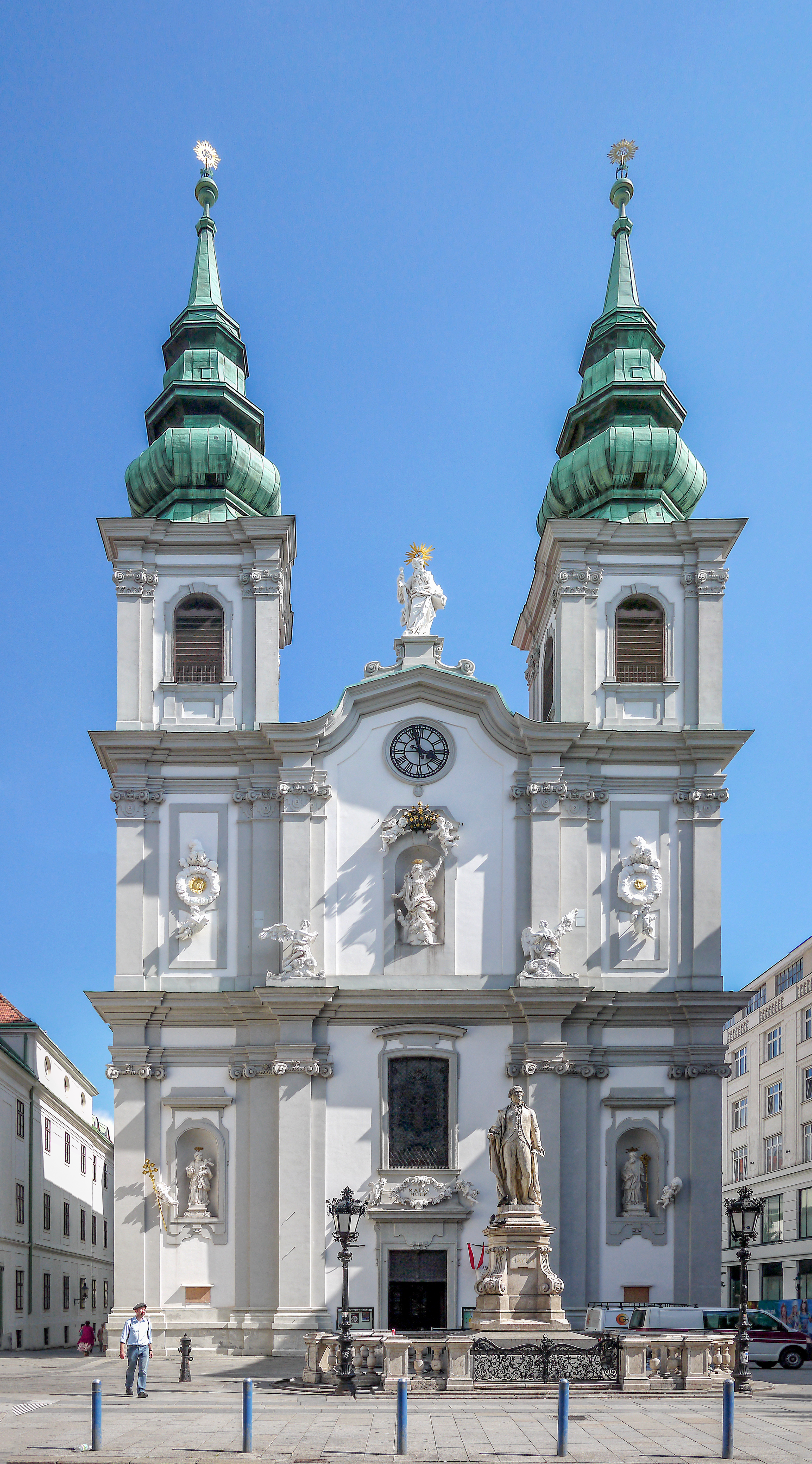 Kath. Pfarrkirche Maria Hilf